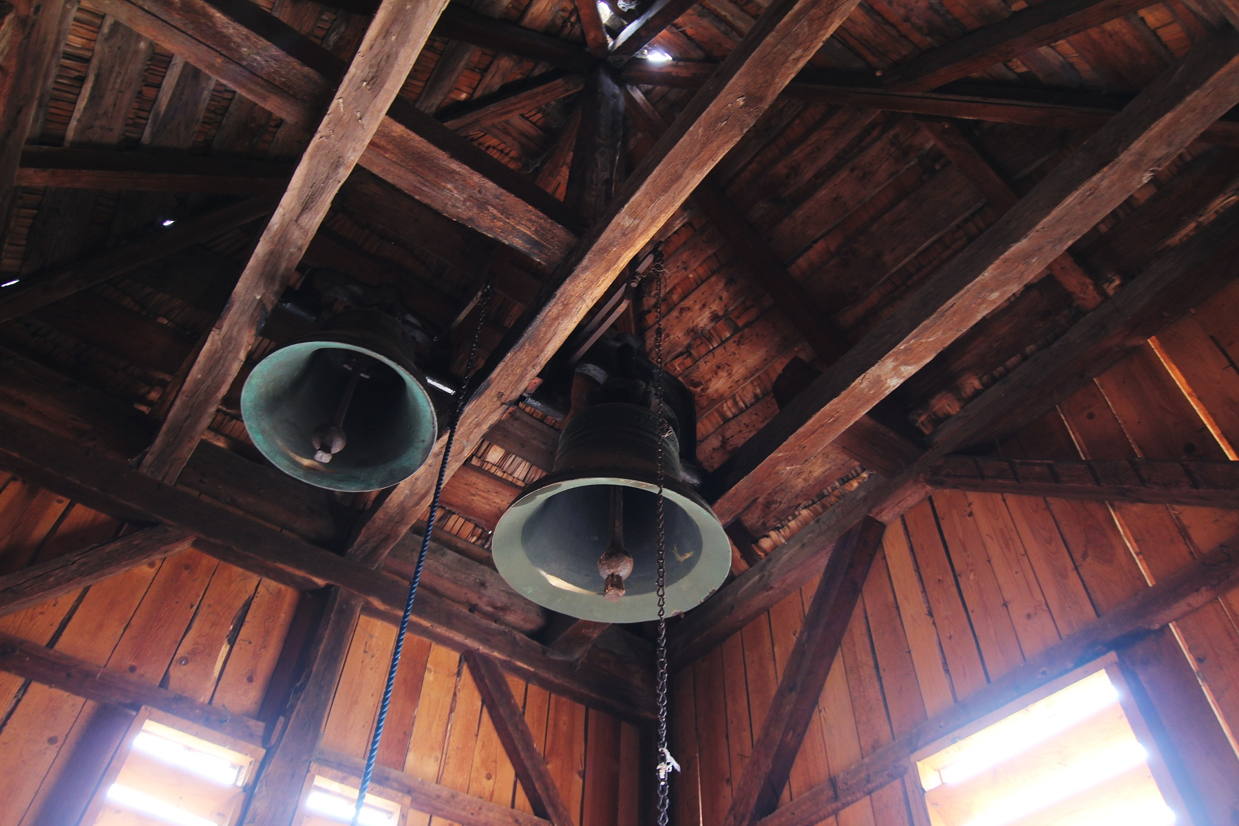 Clopotnița schitului Nămăești 03